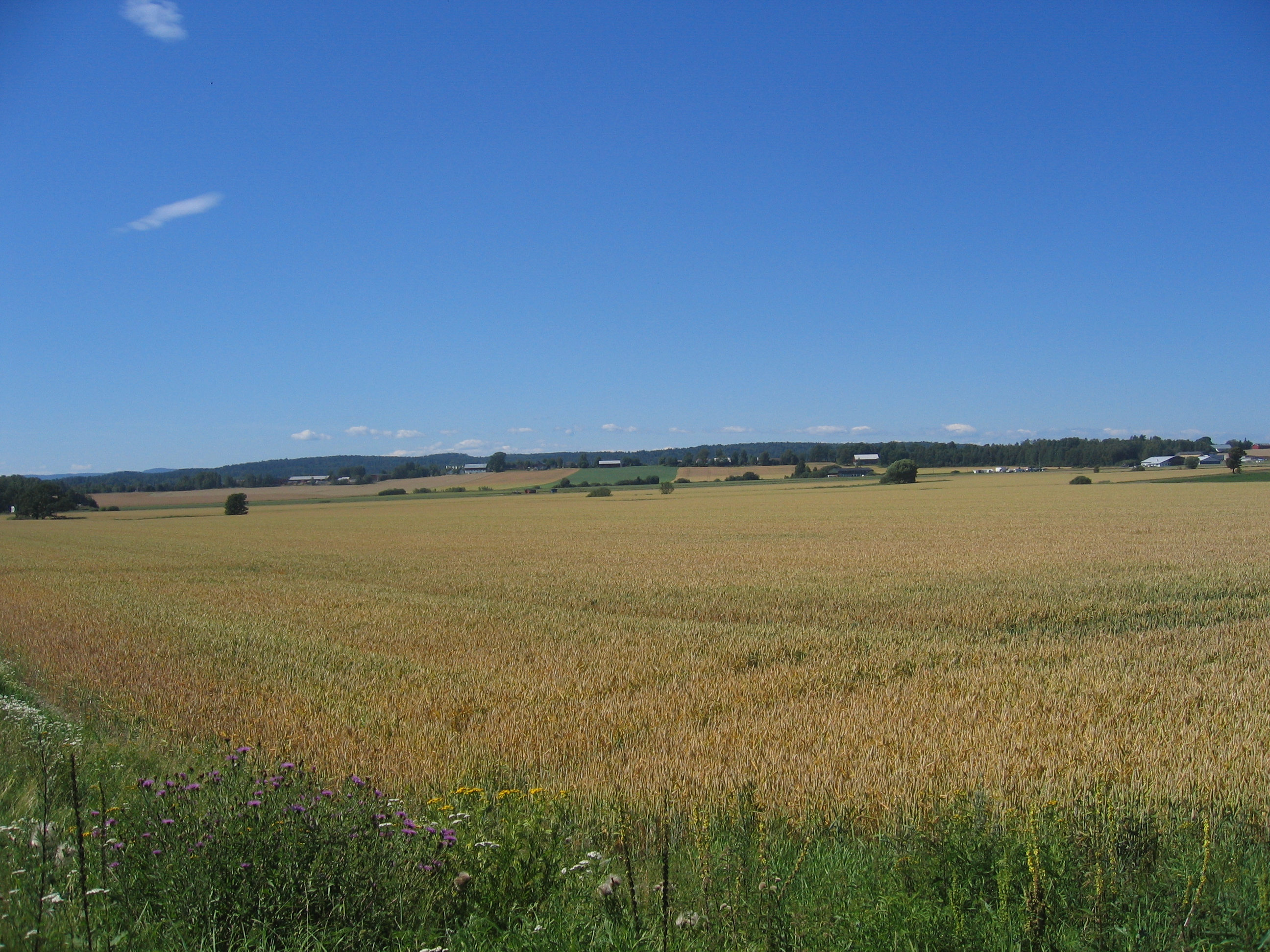 Kornåker ved Jarlsberggata mellom Jarlsberg og Sem. E18 og Raet i bakgrunnen.